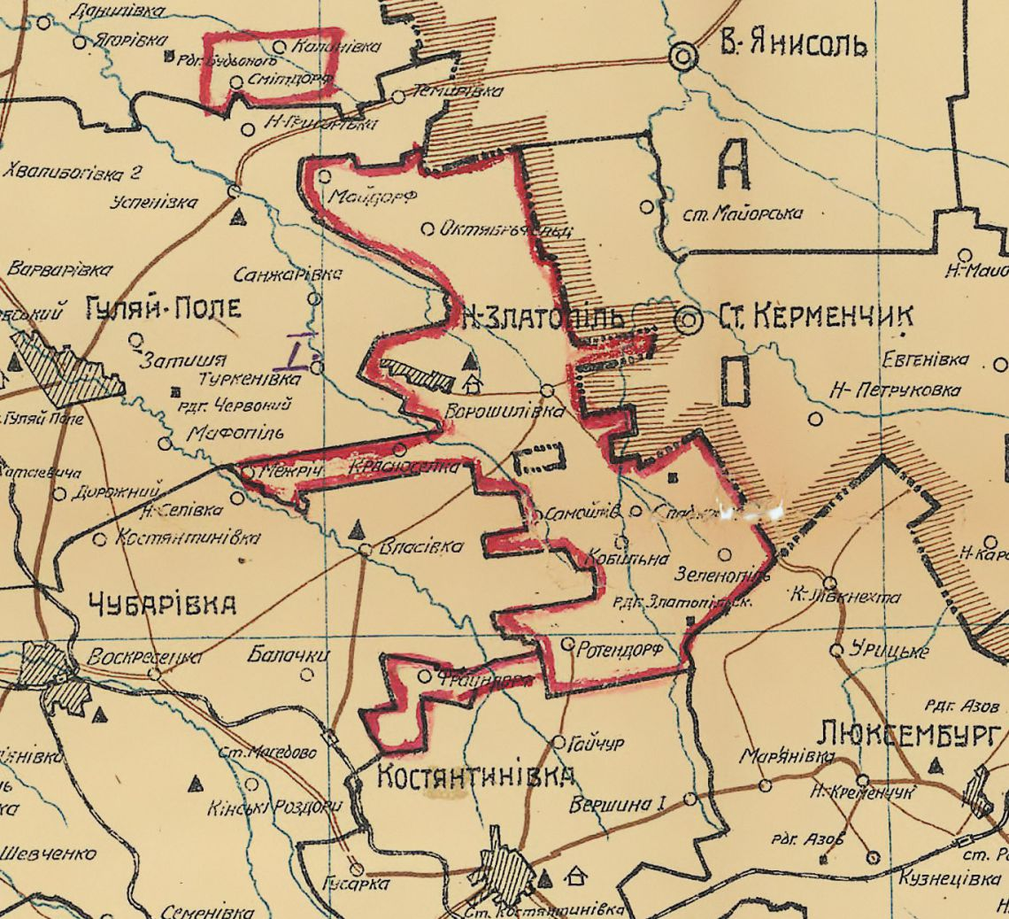 Новозлатопільський єврейський національний район на мапі Дніпропетровської області 1935 року.